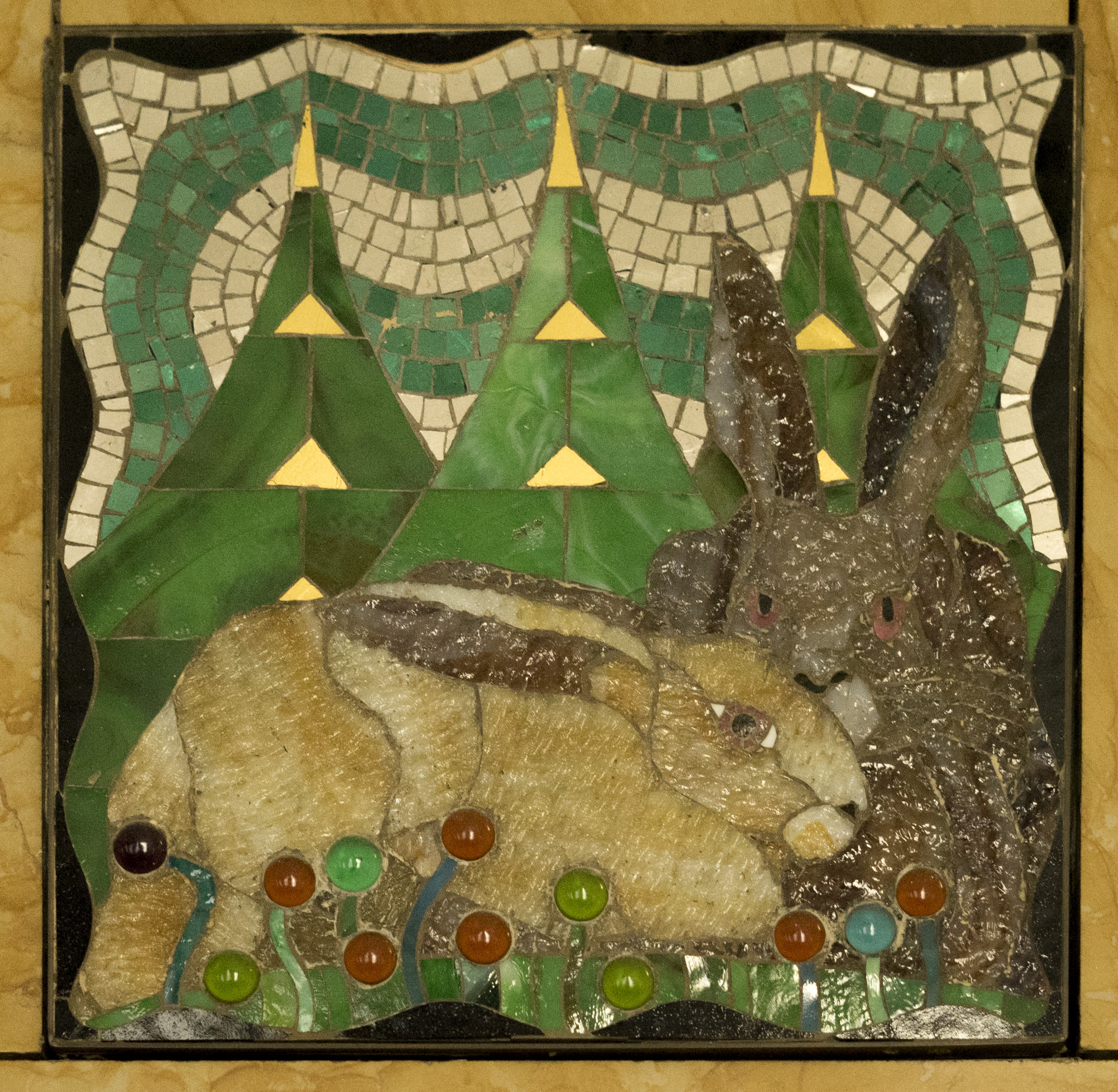 Jugendstilmosaik Hotel Wiesler, Graz 1 Leopold Forstner